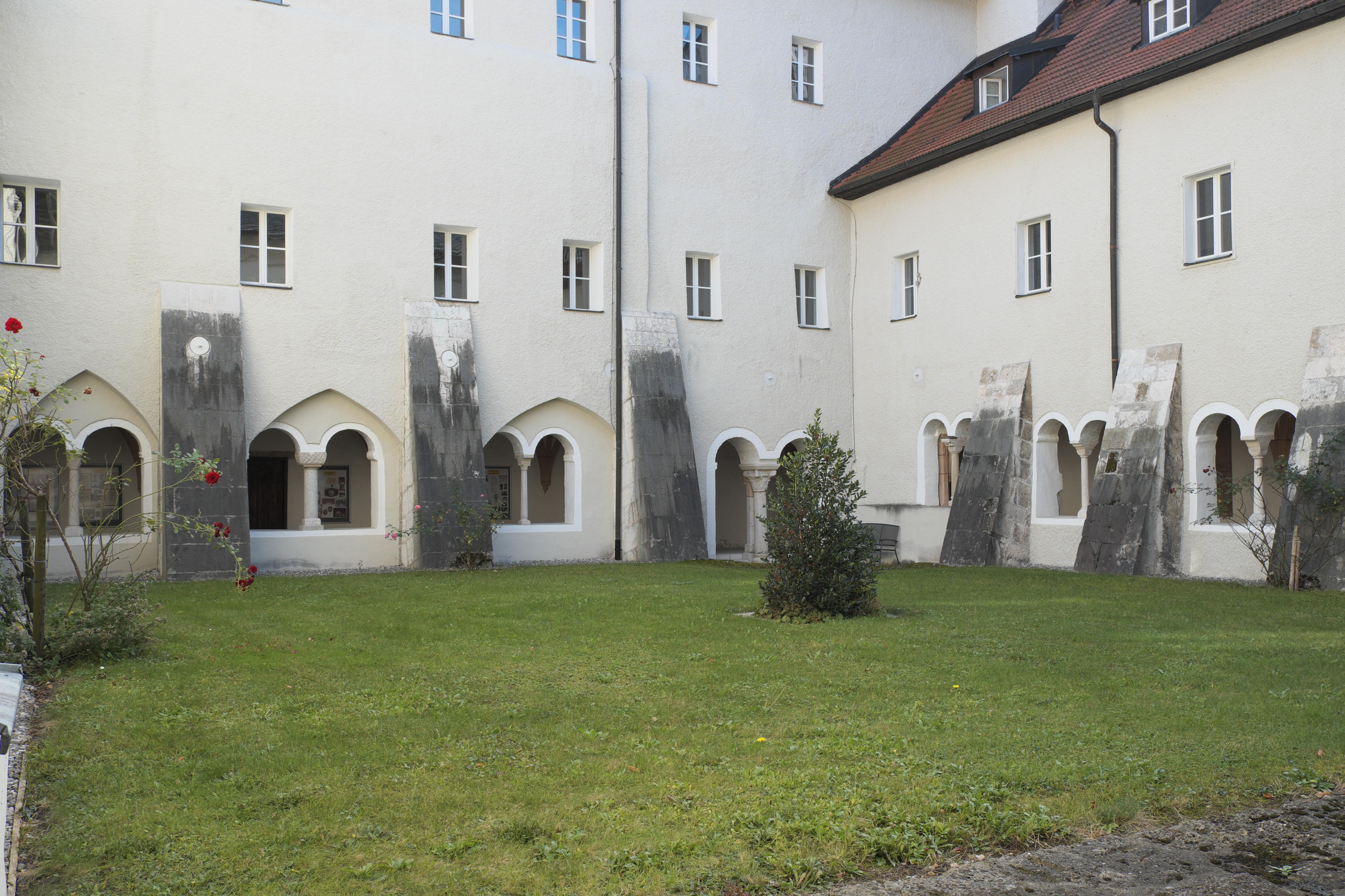 Kloster St. Zeno in Bad Reichenhall im Landkreis Berchtesgadener Land (Bayern/Deutschland), Kreuzgang